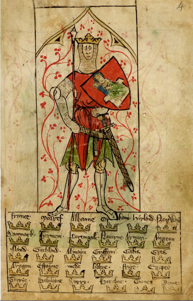 Roi Arthur extrait de Chronicle of England par Peter de Langtoft.